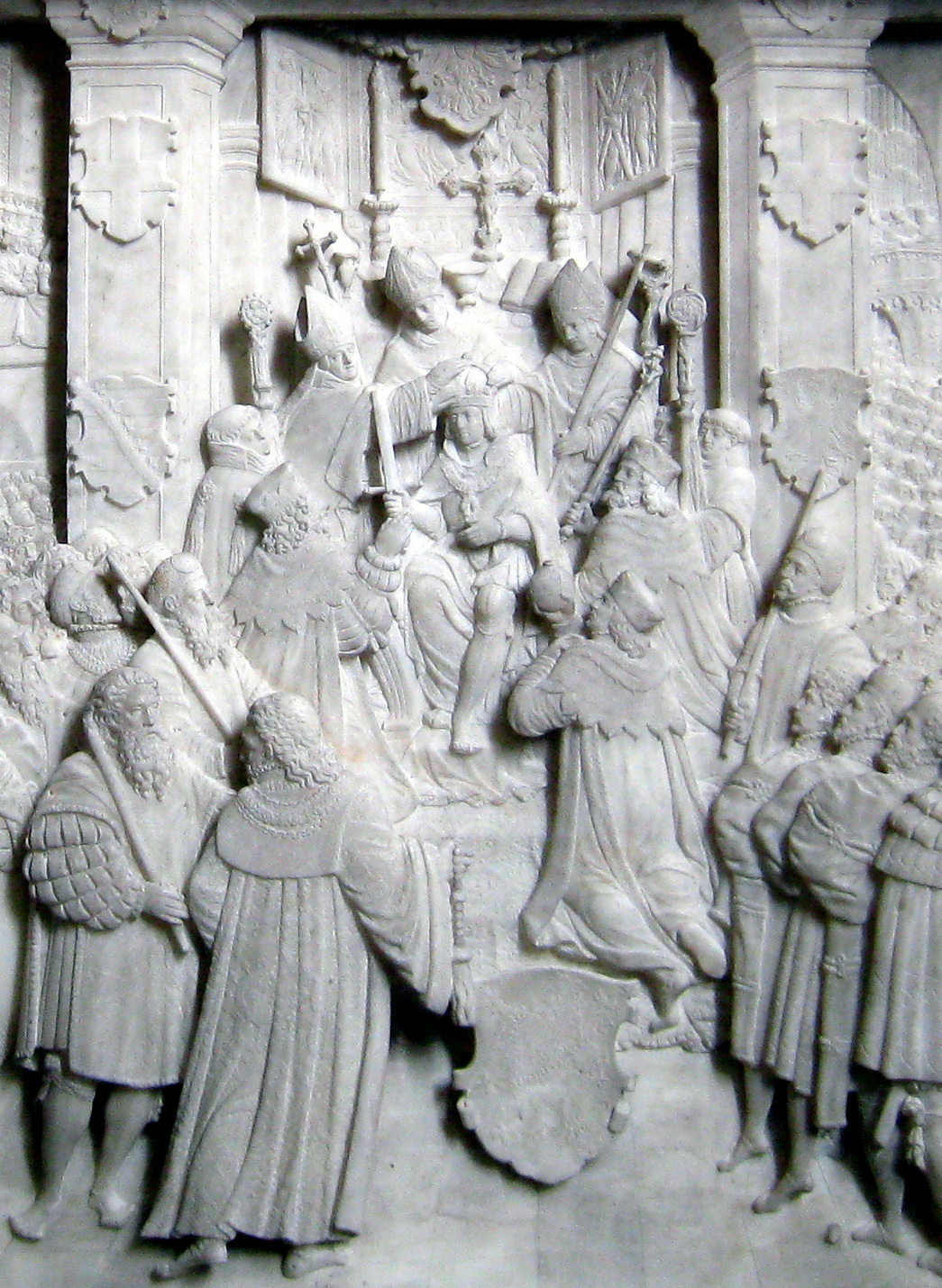 Maximilian I crowned as elected King of the Romans in Aachen